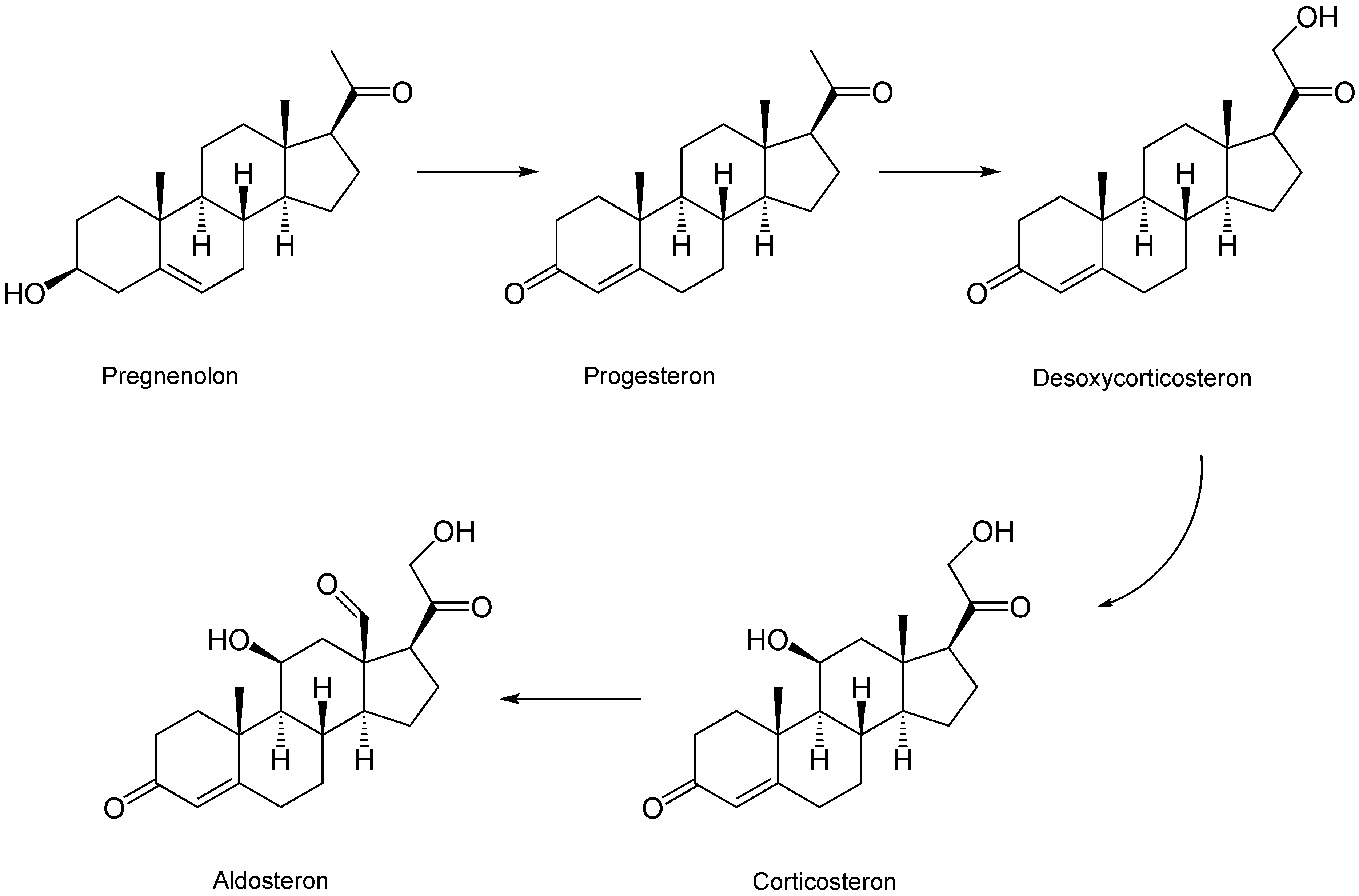 Aldosteronsynthese, ausgehend von Progenolon